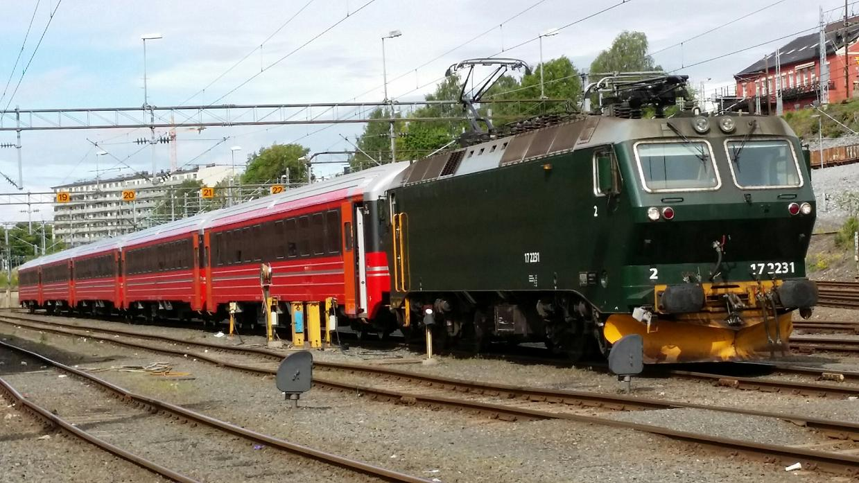 17.2231 går som skiftelokomotiv i Lodalen, Oslo. Vognene er moderniserte B5.